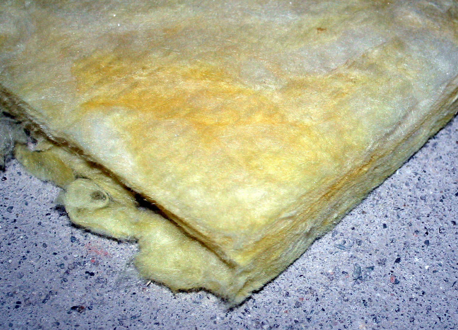 Glaswolle